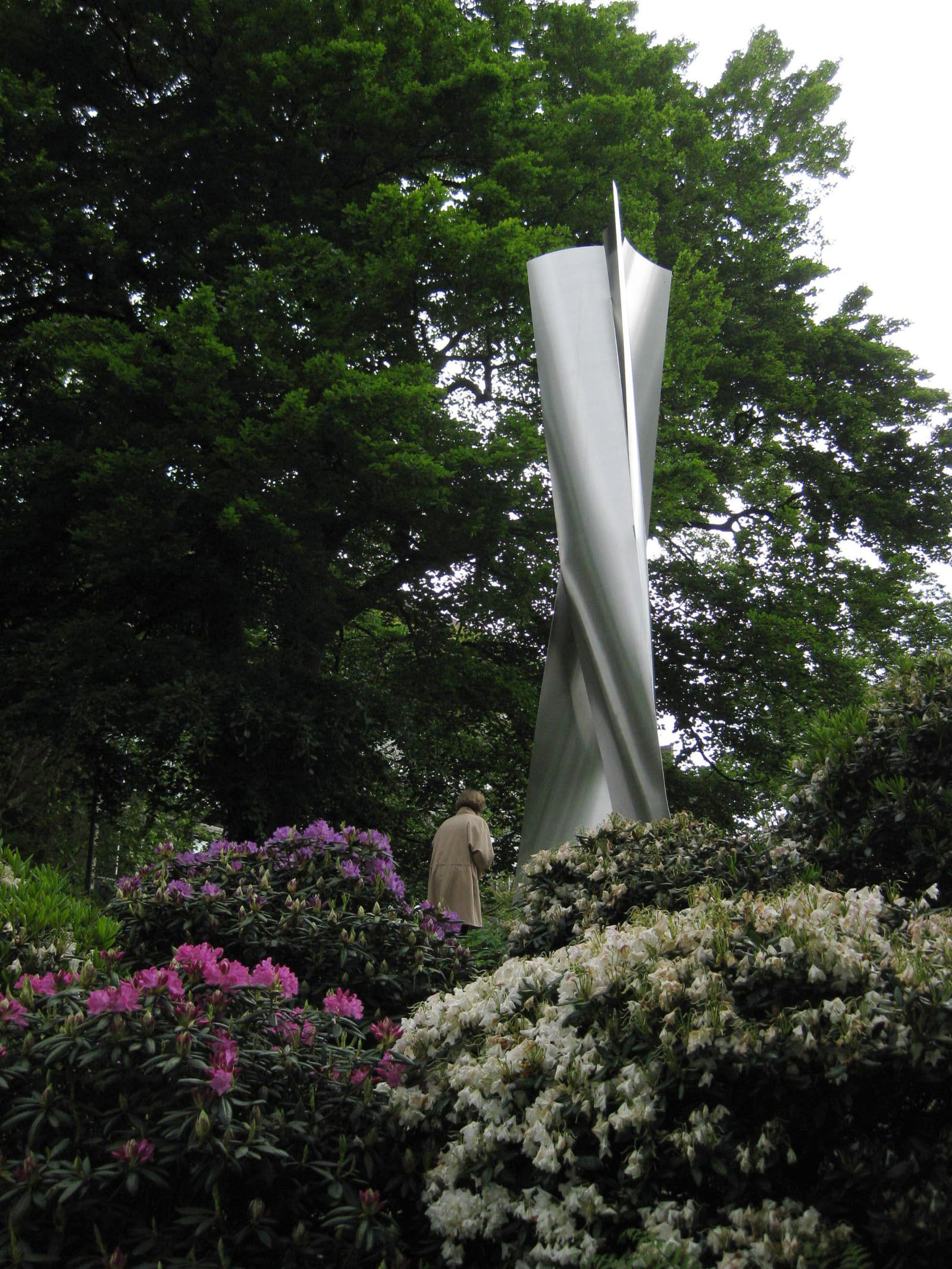 Roland Phleps, "Bündelstele 1", 2007, H: 600 cm - Deutschland, Baden-Württemberg, Freiburg im Breisgau, Mensa Hochallee, Rotteckring